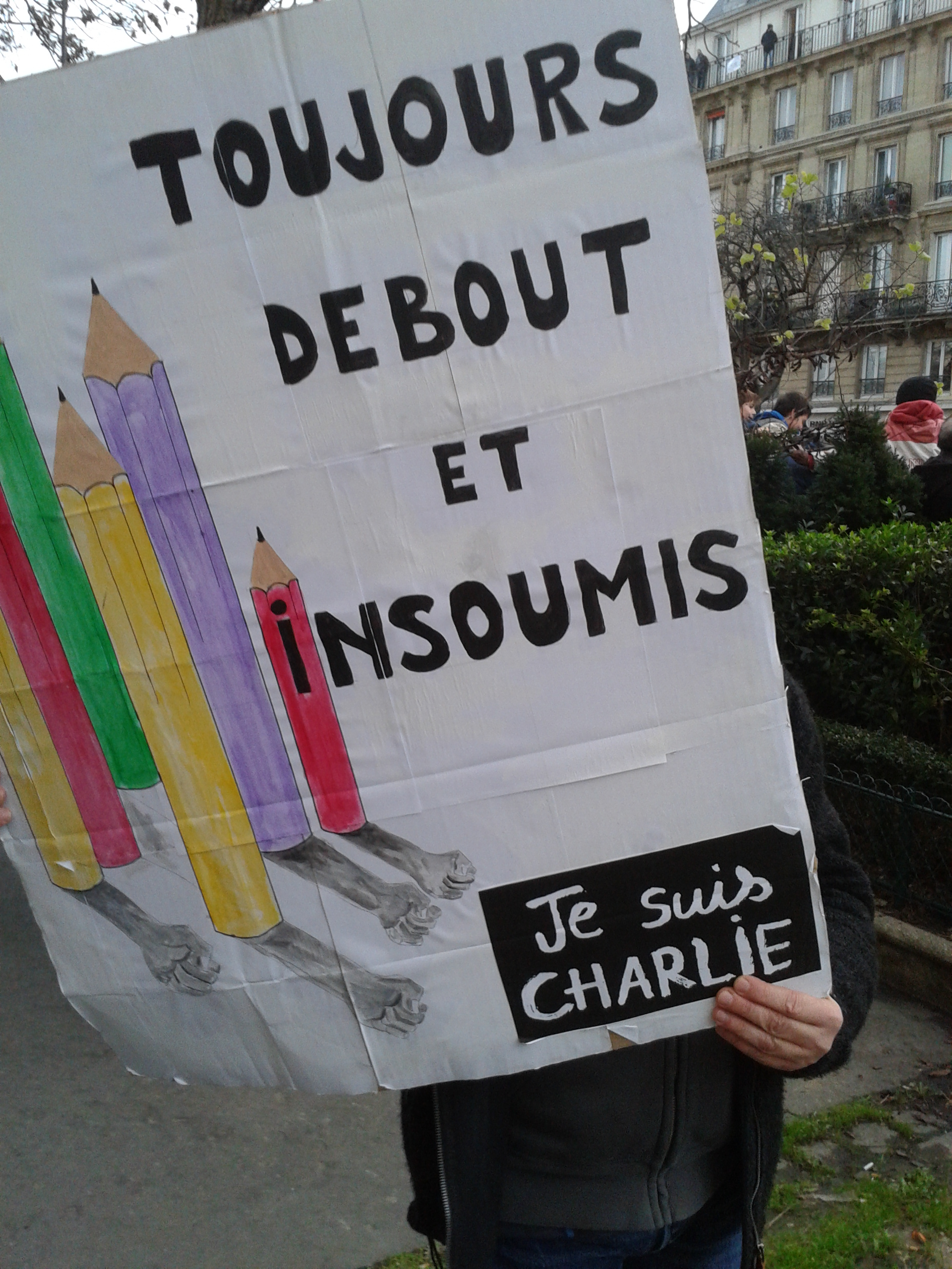 Arrivée de la marche dans le quartier place de la Nation, à Paris